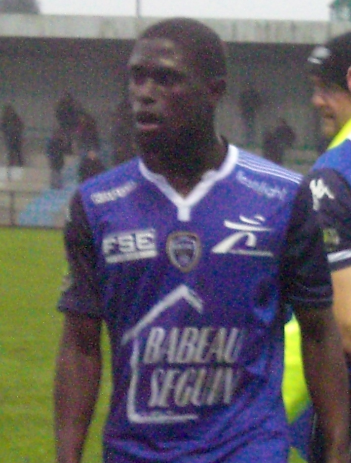 Carlens Arcus lors du match RC Lens B / ES Troyes B, comptant pour la dix-huitième journée du Championnat de France de football amateur (CFA), le13 février 2016, au Stade François Blin d'Avion.